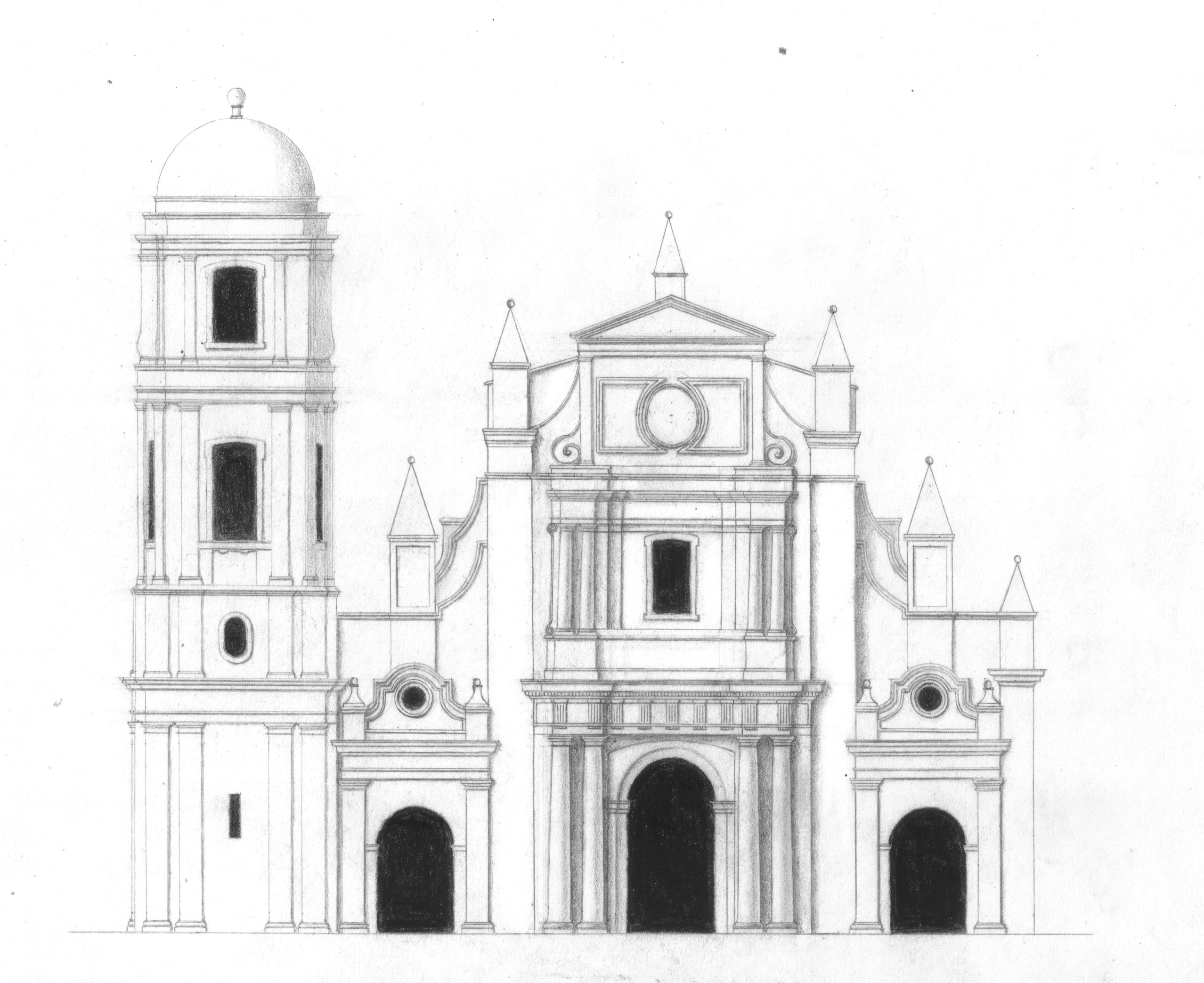 La fachada fue proyectada y construida a partir de 1.772 por el arquitecto español Antonio Garcia. La presente ilustracion es una aproximacion a dicha obra.